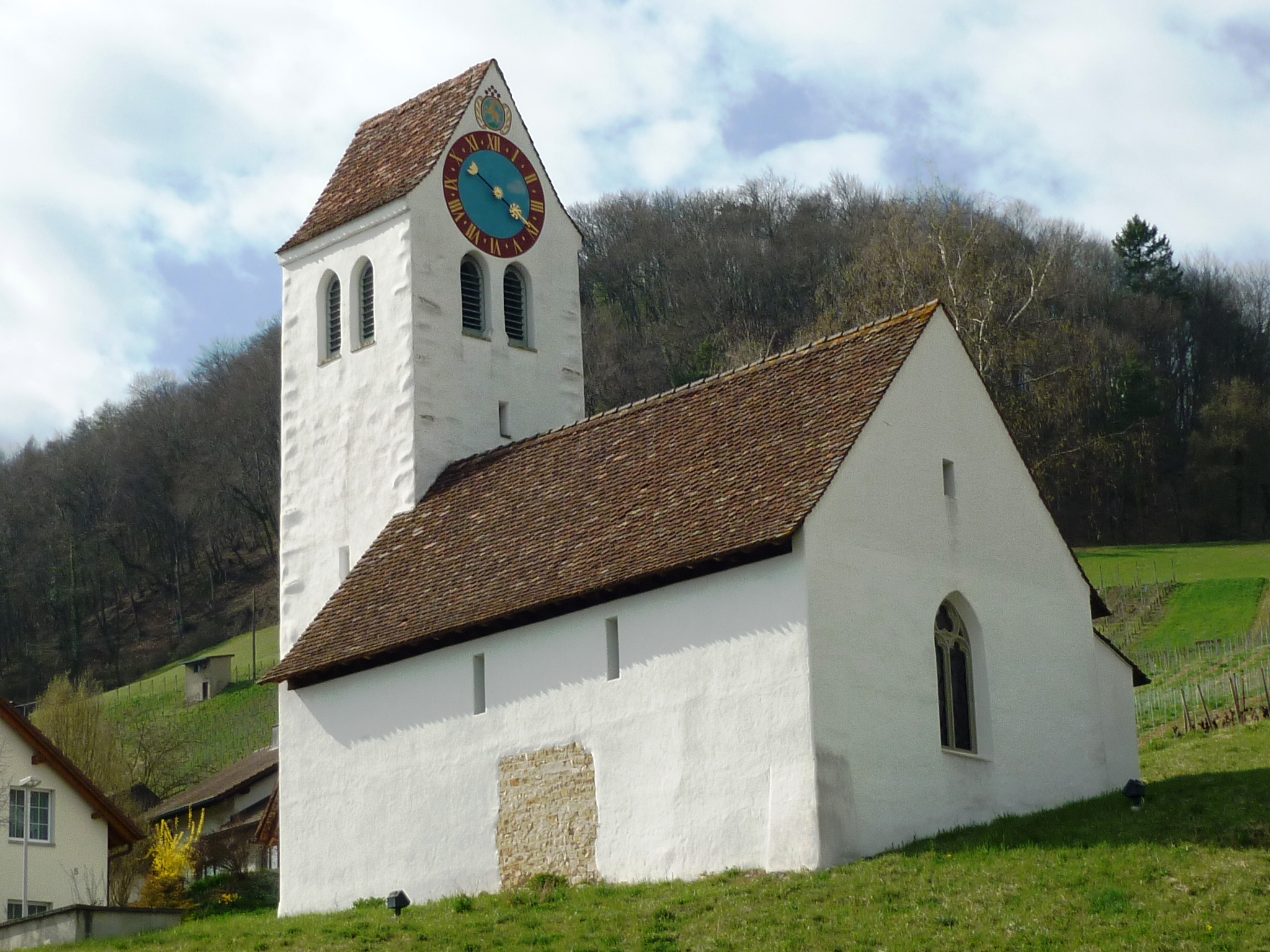 Kirche Remigen AG, Schweiz